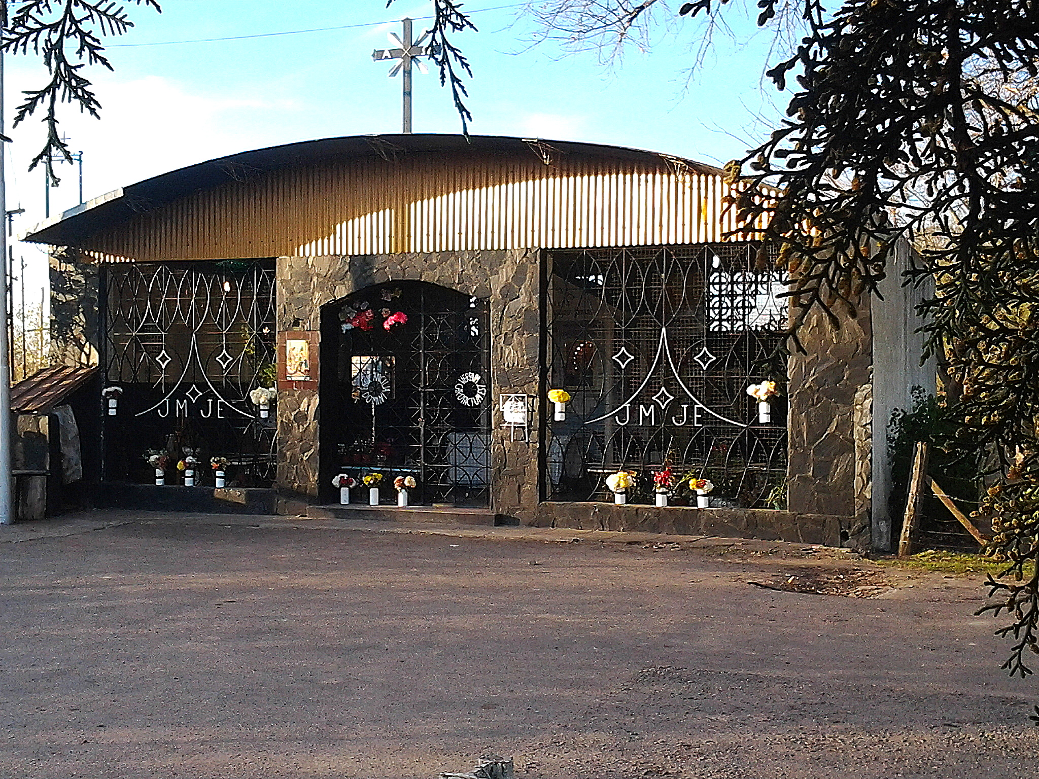 El Lugar del Milagro de la Virgen de Luján Zelaya, Partido del Pilar, Provincia de Buenos Aires